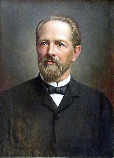 Porträt von David Ritter von Schönherr.